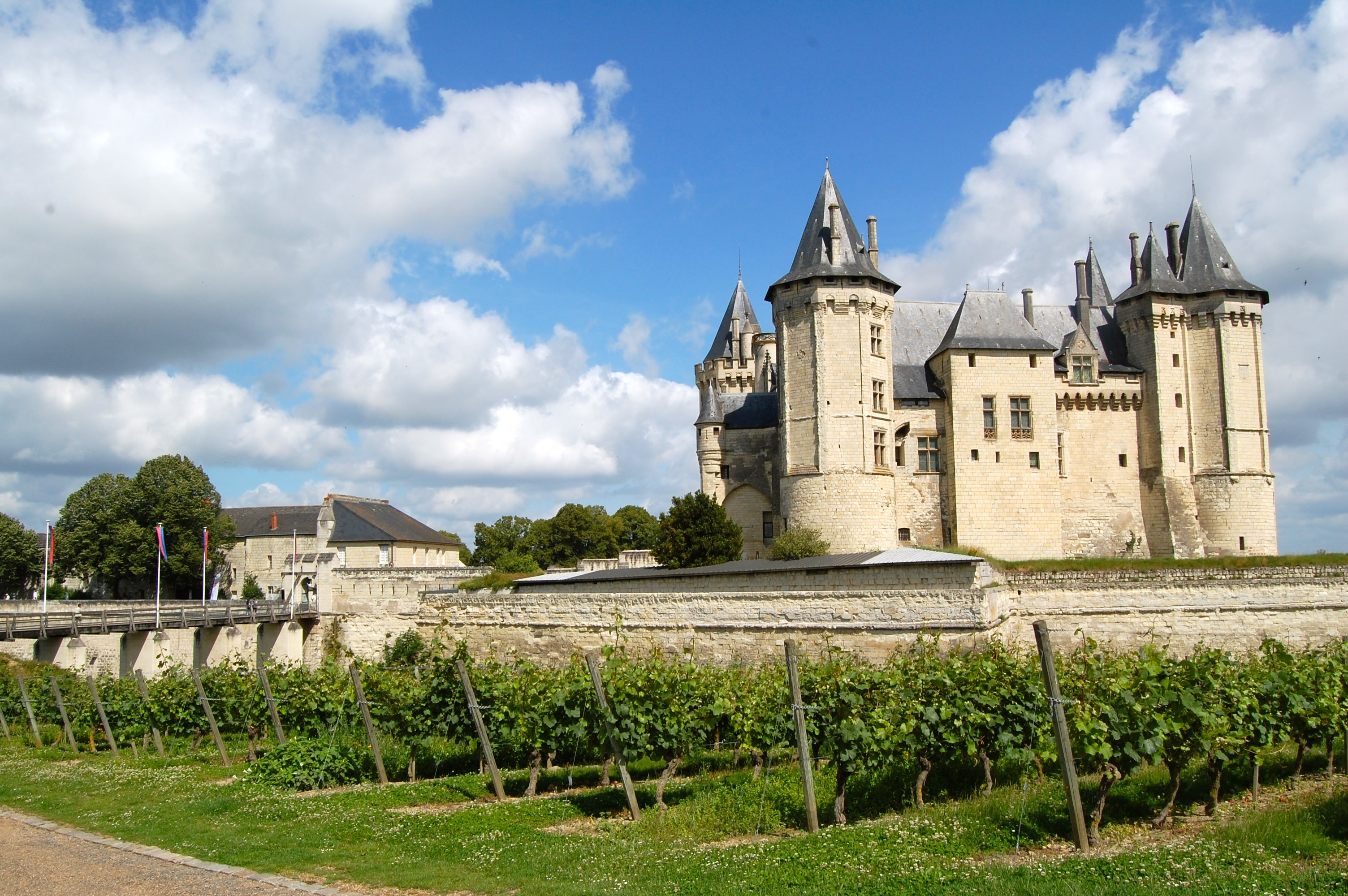 Vignes du château de Saumur